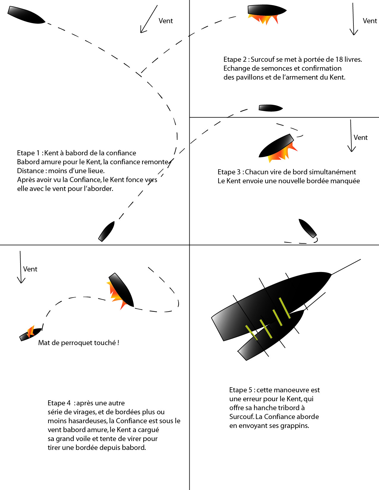 Schéma expliquant la prise du Kent par la Confiacne